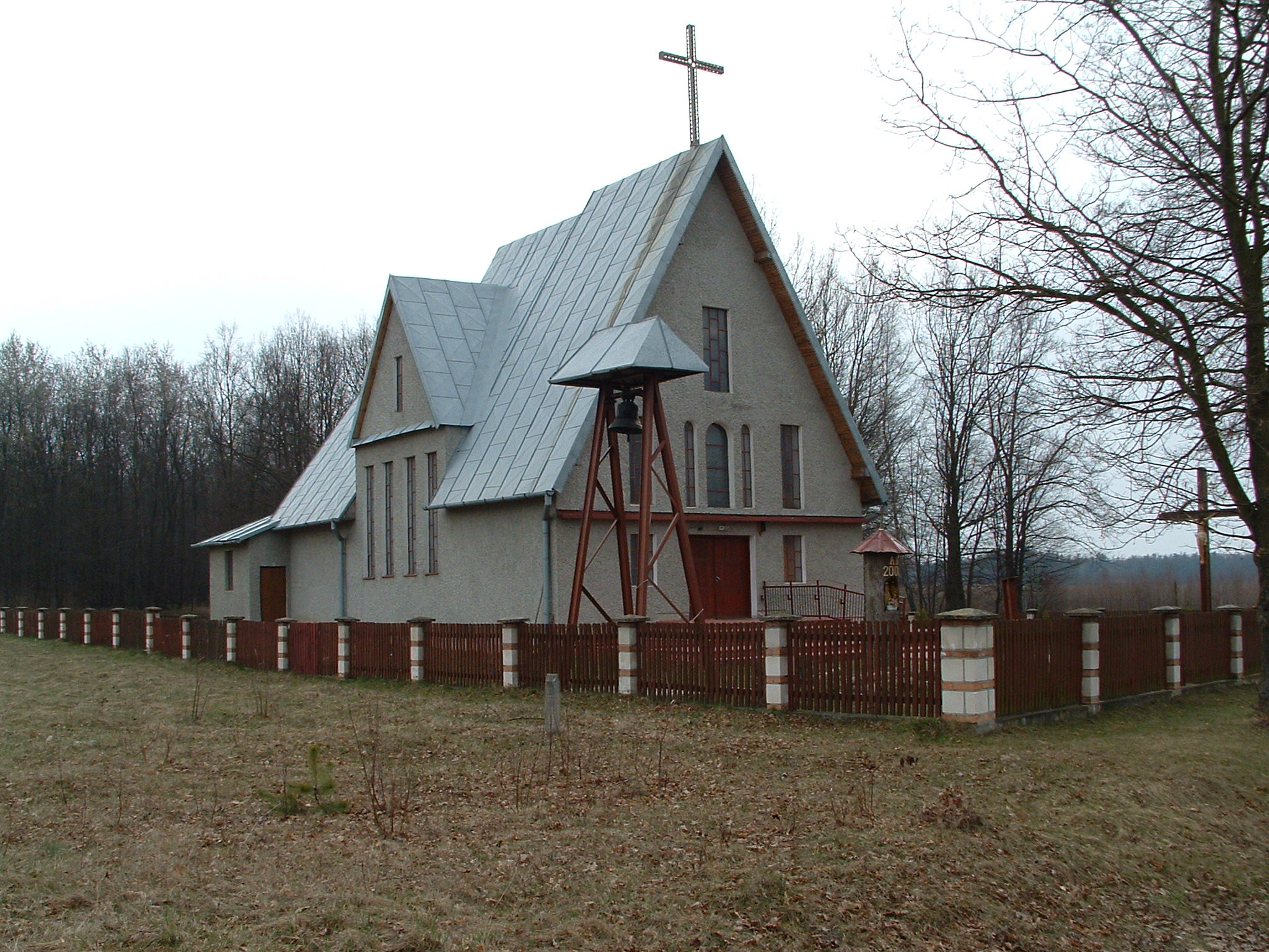 Kościół w Wólce Horynieckiej